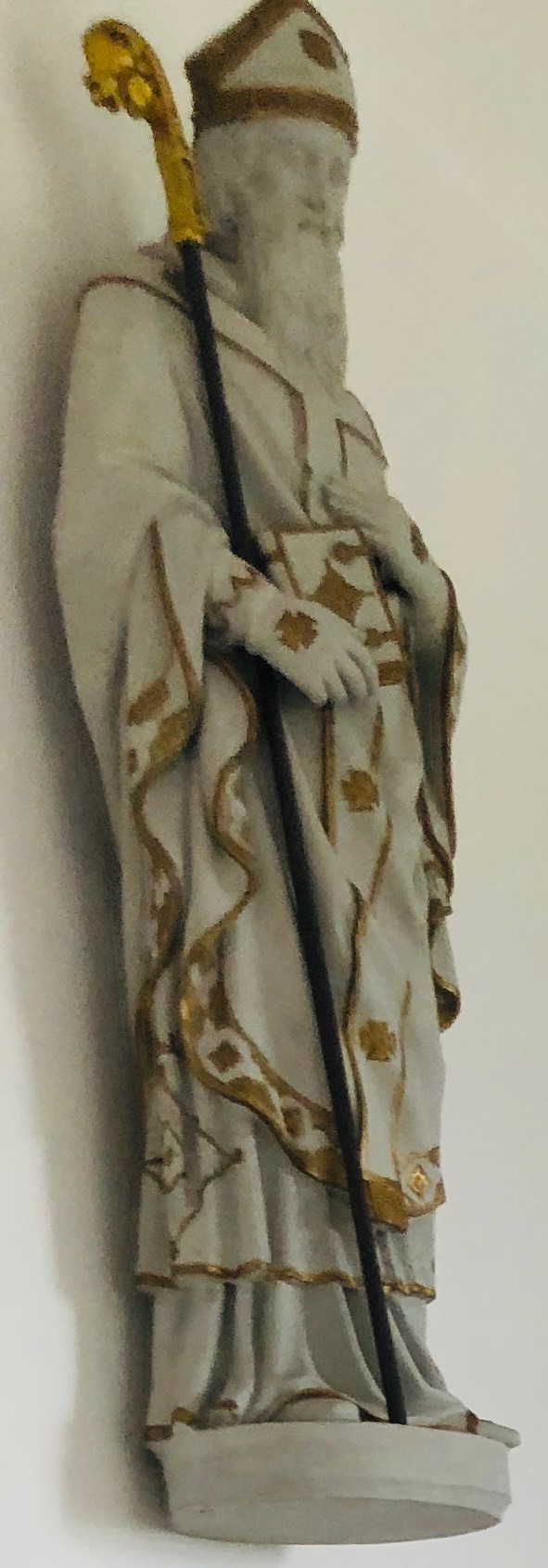 Statue des Hl. Nikolaus in der Ahekapelle in Engelgau Nettersheim, NRW Deutschland